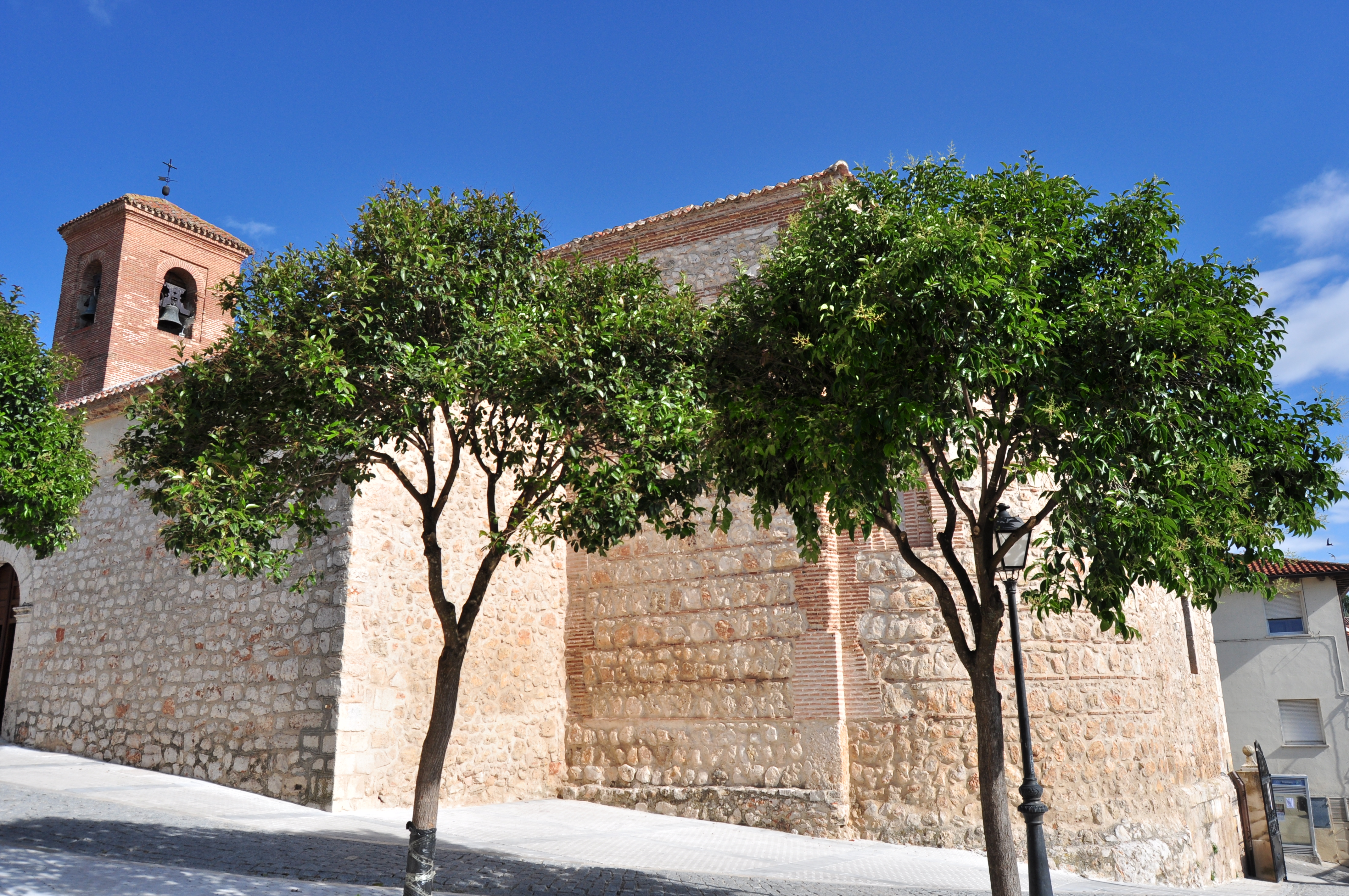 Valdilecha - 006